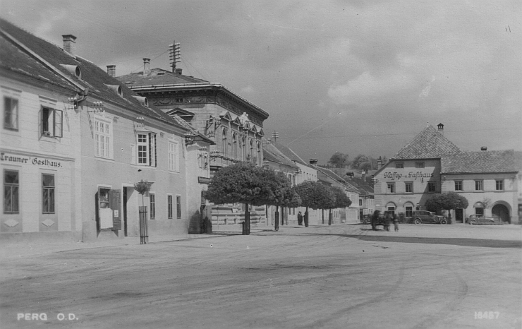 Der Perger Hauptplatz auf einer Postkarte (O.D. Oberdonau), das Bild könnte jedoch schon um 1930 entstanden sein.